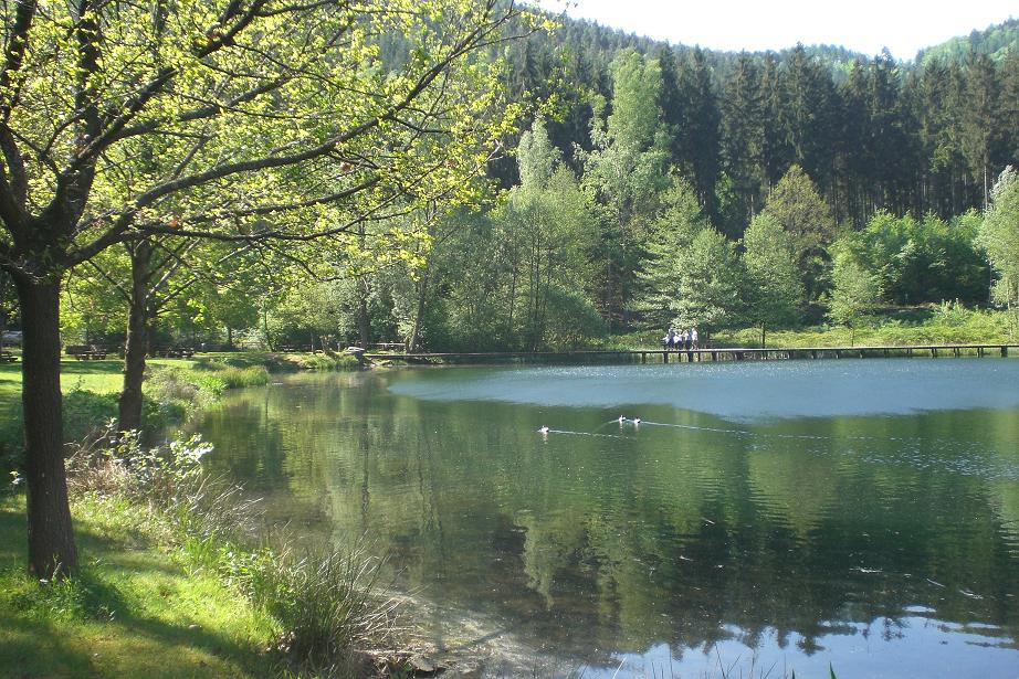 Helmbachweiher